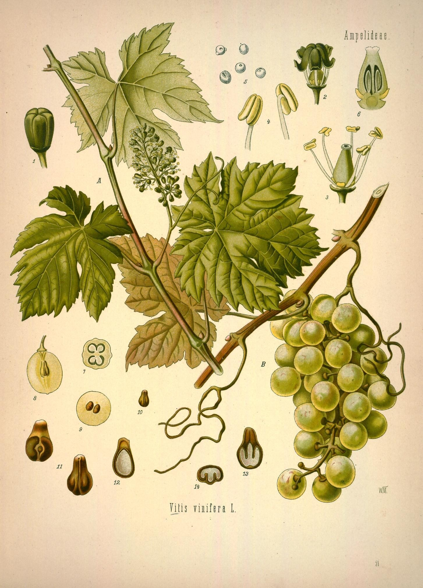 Weinrebe. A blühender, B fruchtender Zweig in natürl. Grösse; 1 geschlossene und 2 aufgeblühte Blüthe mit abgehobener Krone, vergrössert; 3 Blüthe ohne Krone, desgl.; 4 Staubgefässe, desgl.; 5 Pollen, desgl.; 6 Stempel im Längsschnitt, desgl.; 7 derselbe im Querschnitt; 8 u. 9 Frucht im Längs- und Querschnitt, natürl. Grösse; 10 Same, desgl.; 11 derselbe von verschiedenen Seiten, vergrössert; 12 u. 13 derselbe im Längsschnitt, von verschiedenen Seiten, desgl.; 14 derselbe im Querschnitt.